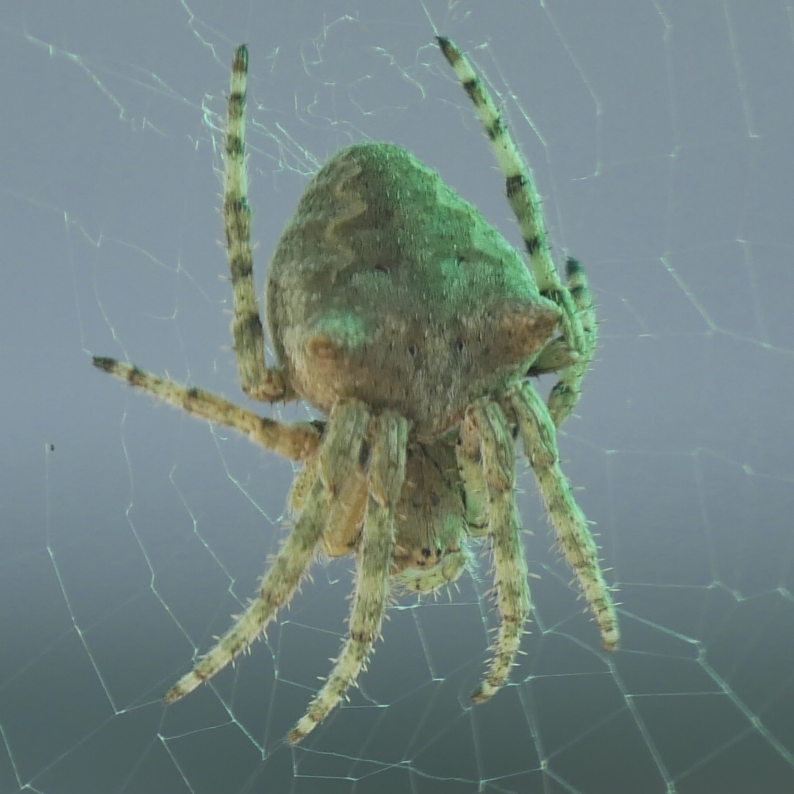 Gibbaranea gibbosa_Hungary